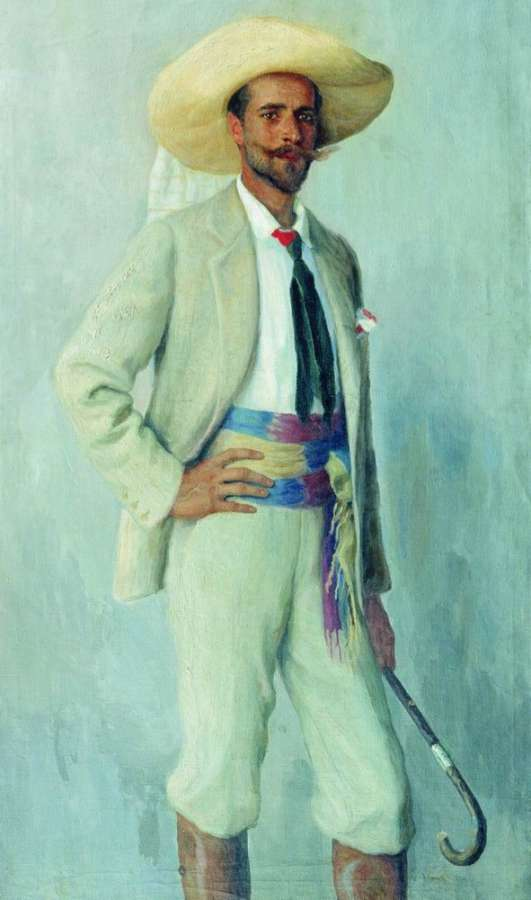 Портрет А.К.Горчакова. 1904 (Омск)